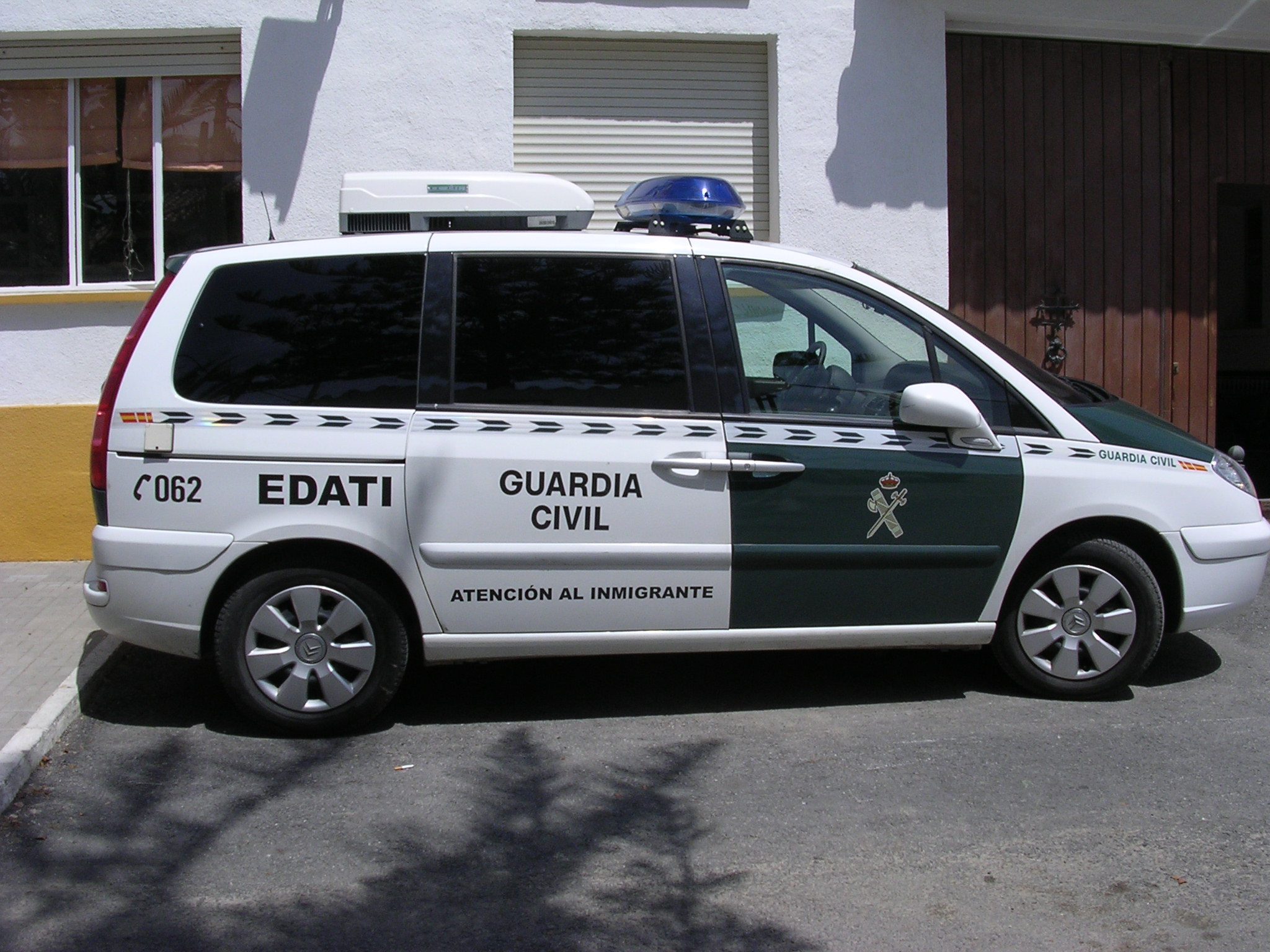 Vehículo de servicio de un EDATI, convertible en oficina móvil.